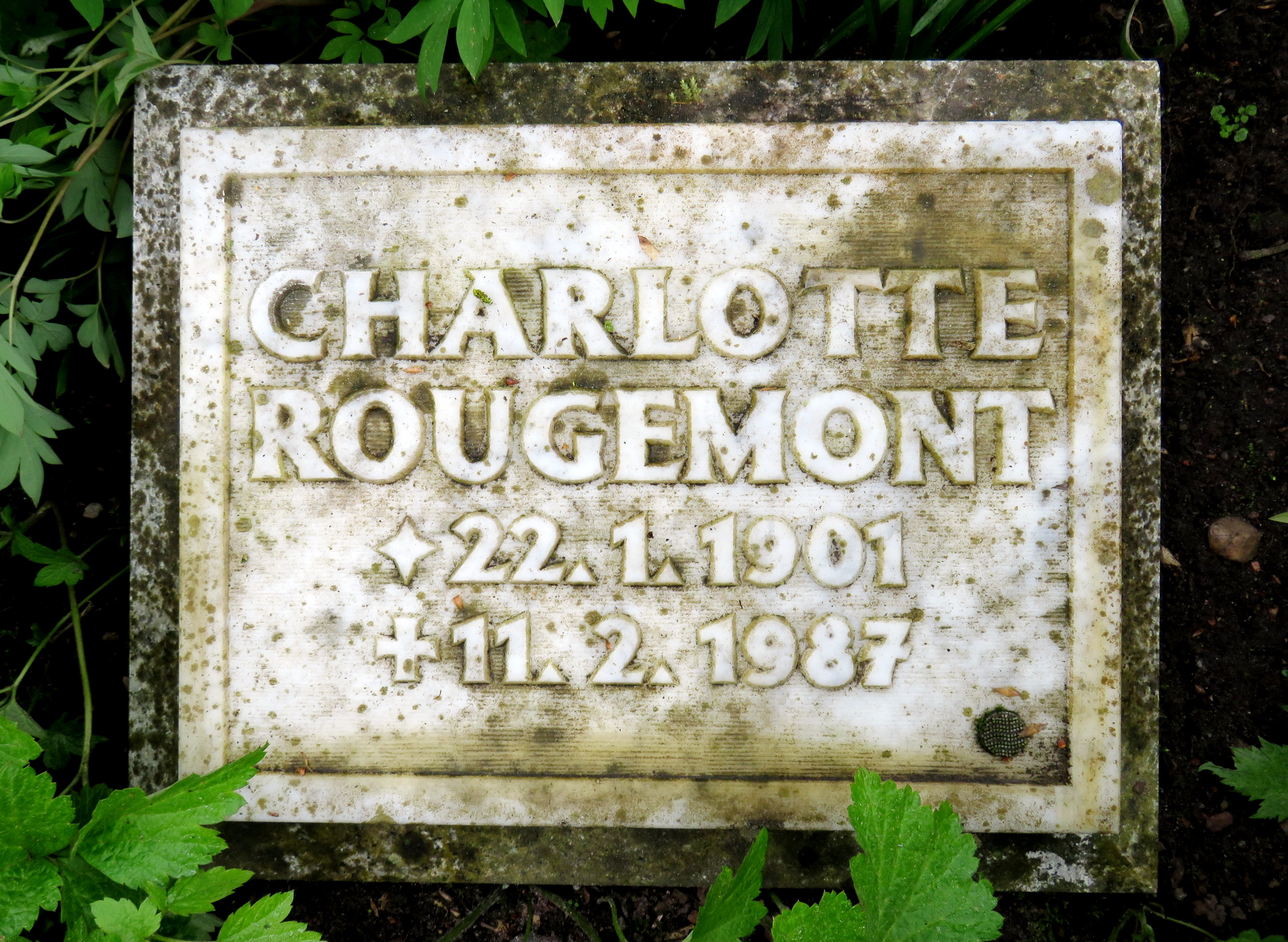 Historischer Grabstein der Hamburger „Märchenerzählerin“ Charlotte Rougemont im Bereich des Gartens der Frauen auf dem Ohlsdorfer Friedhof in Hamburg-Ohlsdorf.